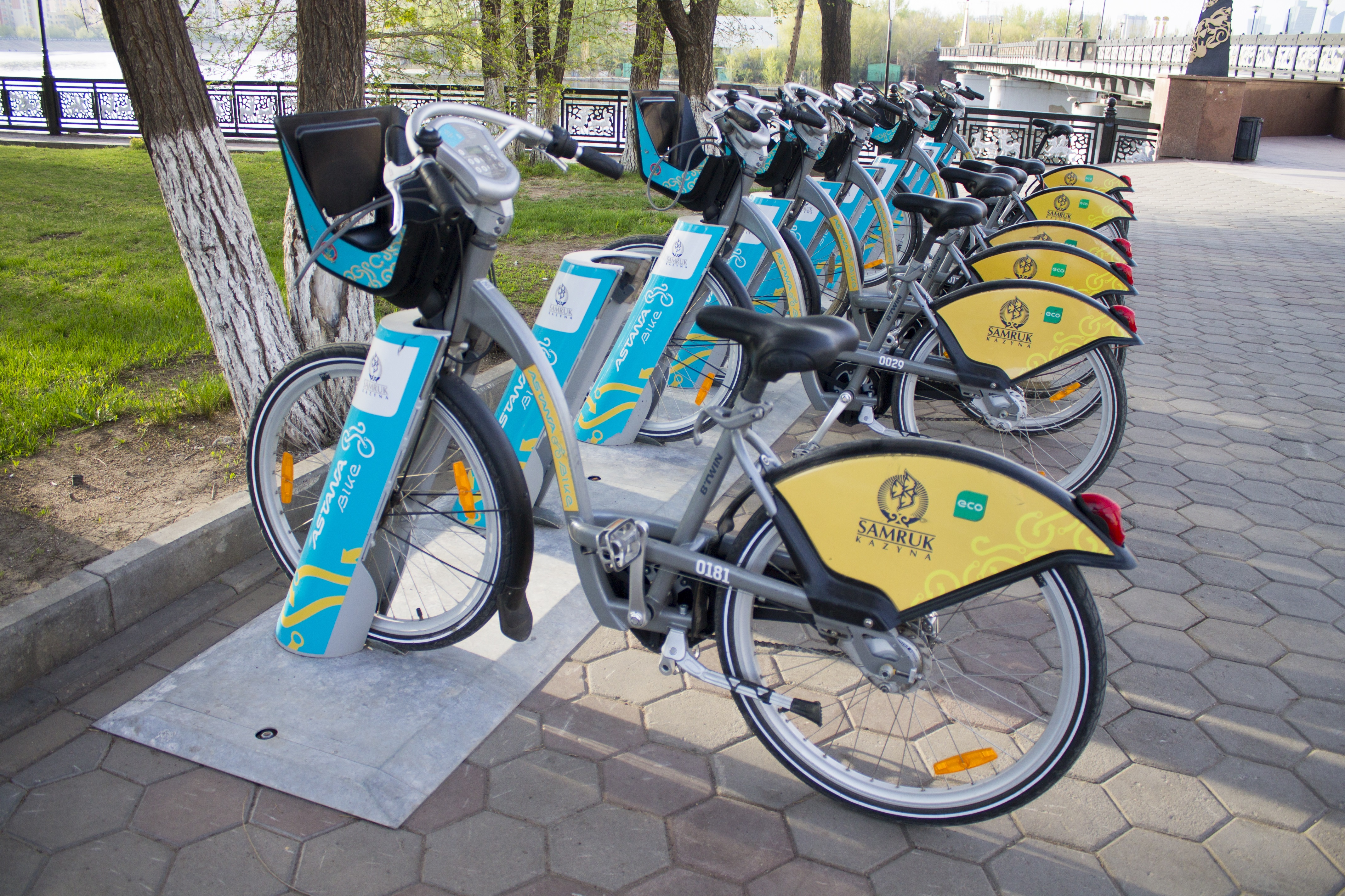 Велосипедная парковка "Astana Bike" на Набережной Нур-Султан